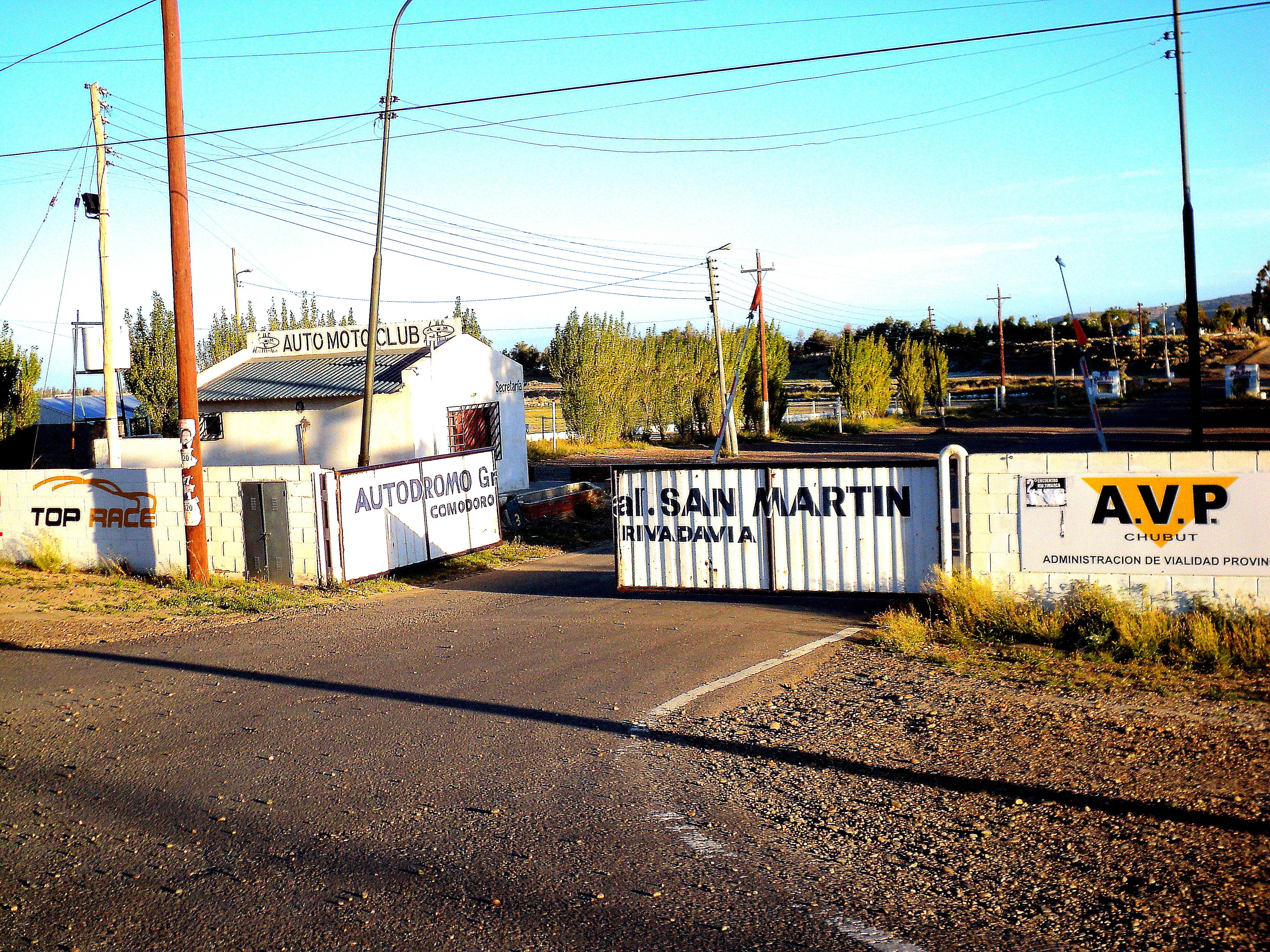 ingreso al autodromo Genaral San Martin